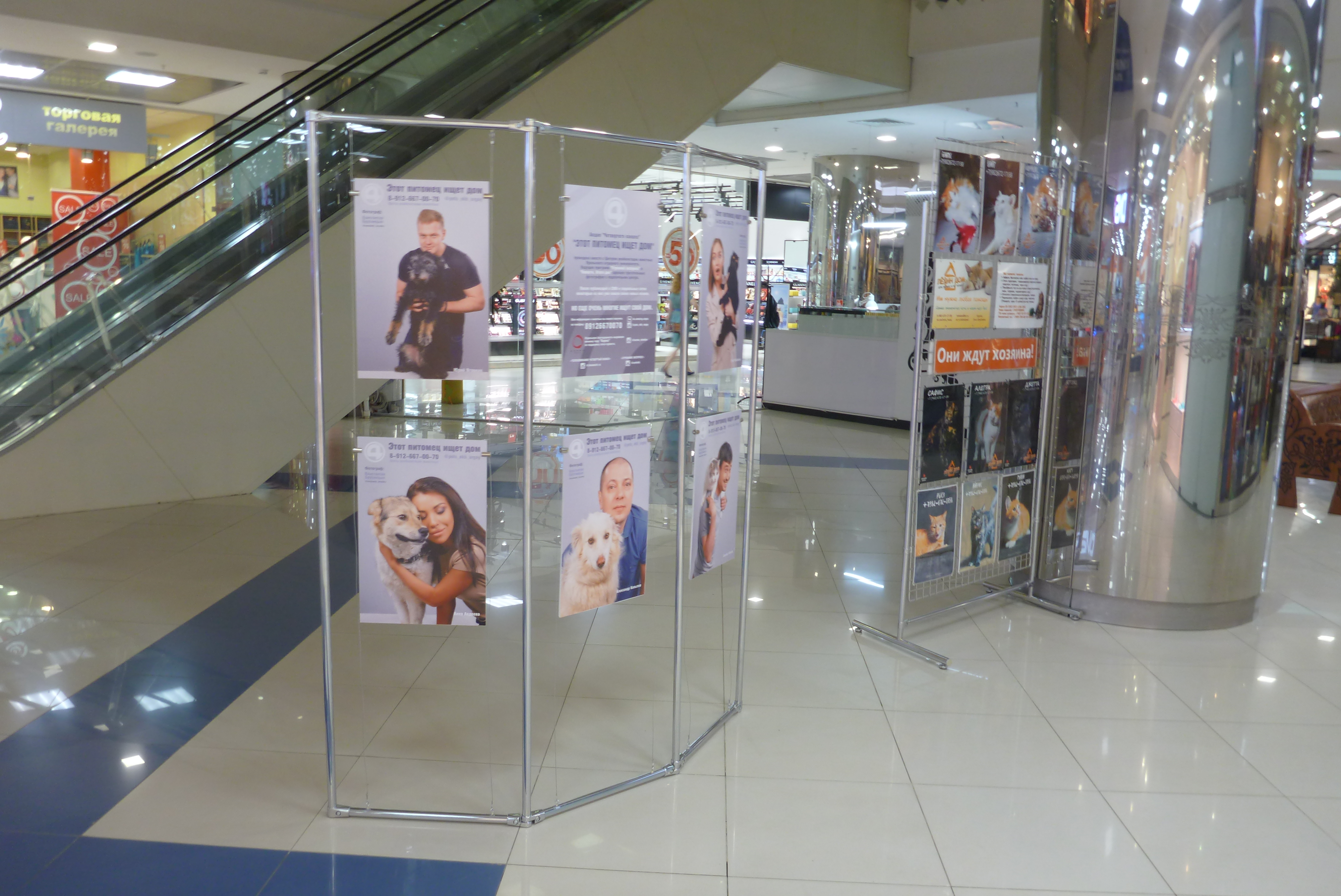 Зоозащитный стенд компании 4 канал Екатеринбург торговый центр Алатырь 19 июля 2019 года